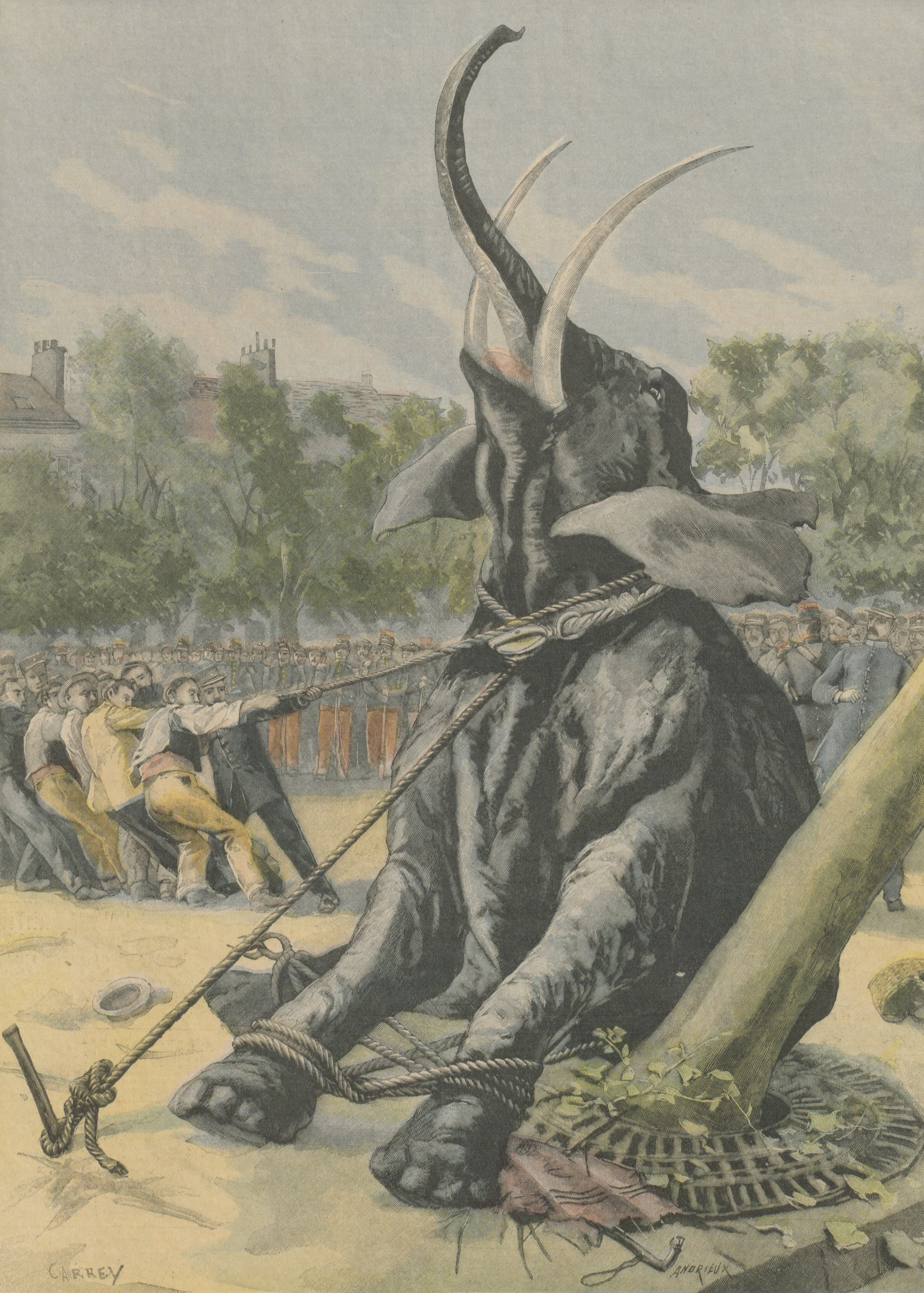 "Fin tragique d'un éléphant".